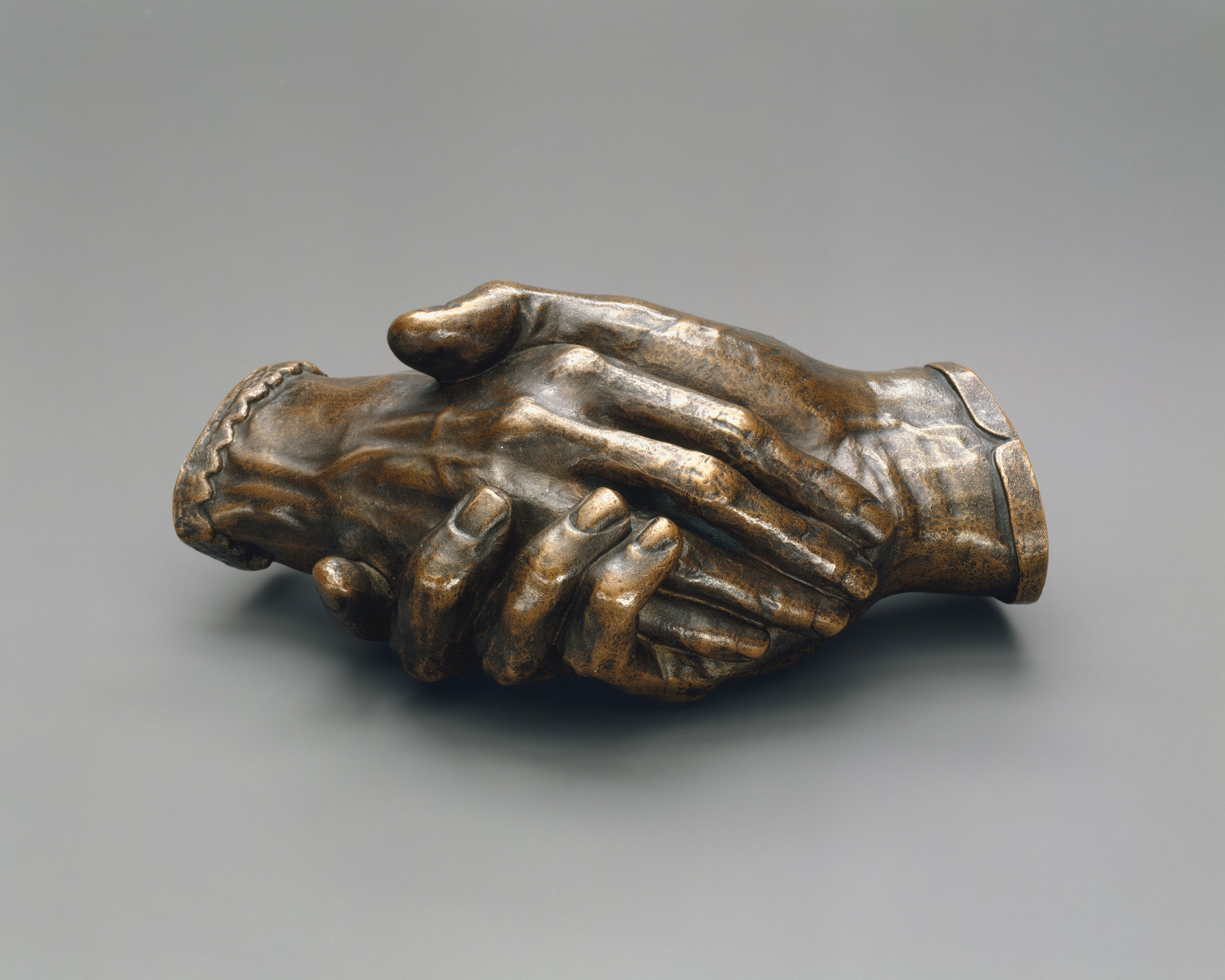 Sculpture; Sculpture